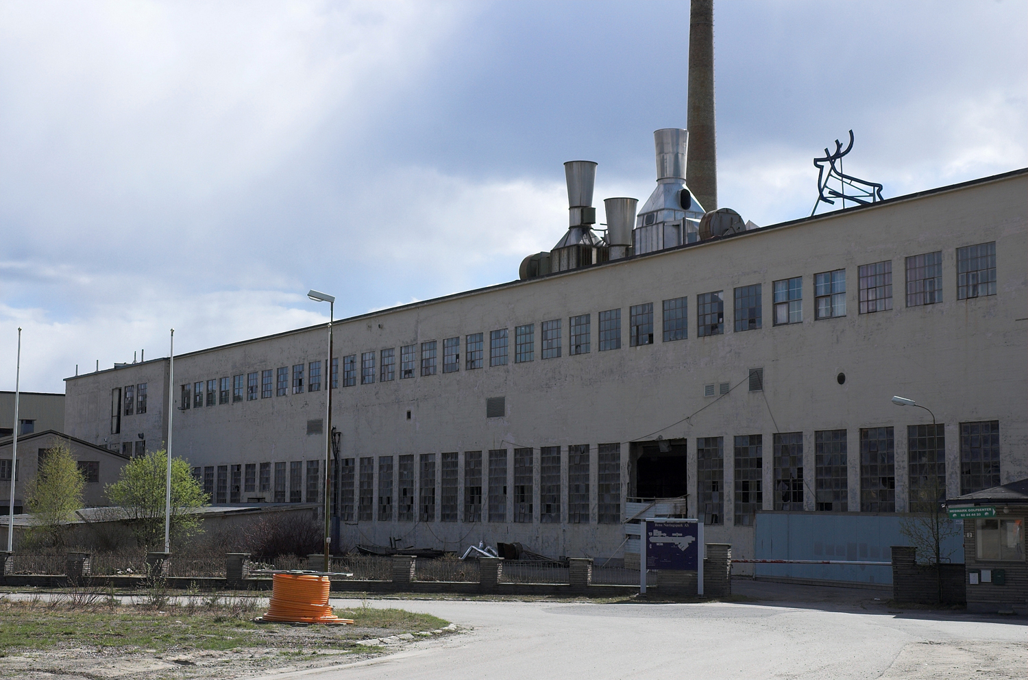 Rena kartonfrabrikk as